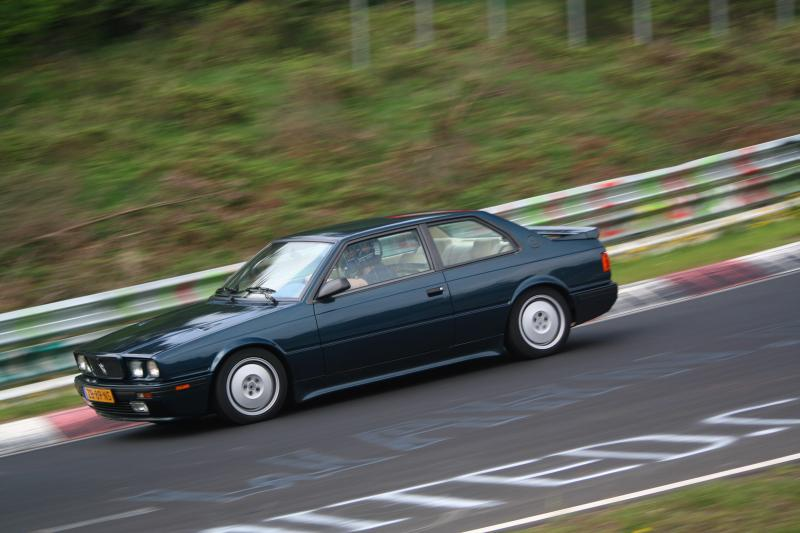 Maserati 222SE on Nürburgring